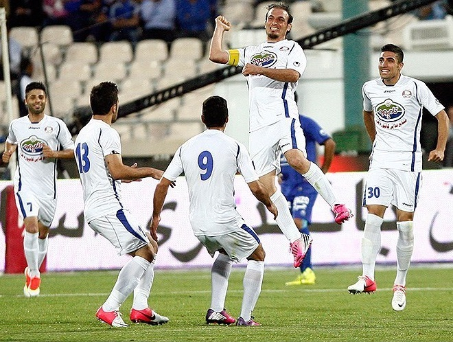 گلزنی محدرضا مهدوی کاپیتان داماش گیلان به استقلال تهران